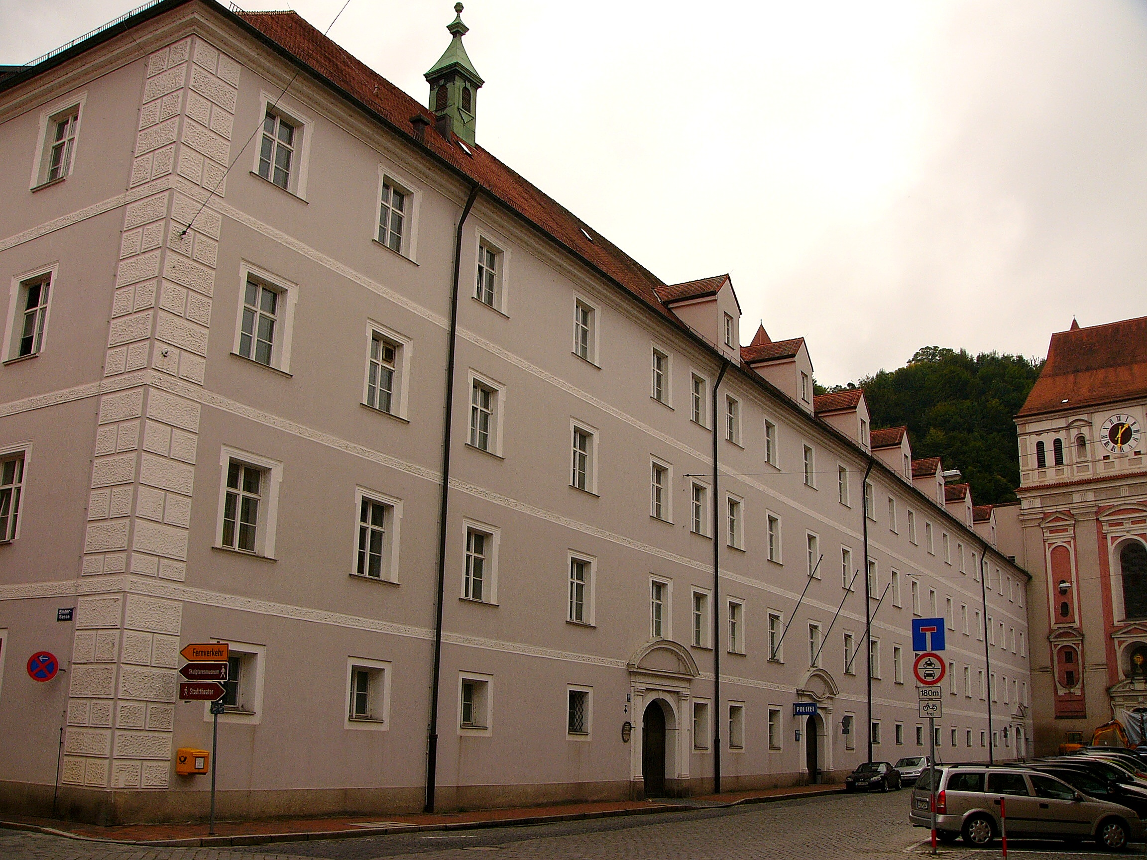 Ehem. JesuitenkollegiumThis is a photograph of an architectural monument.